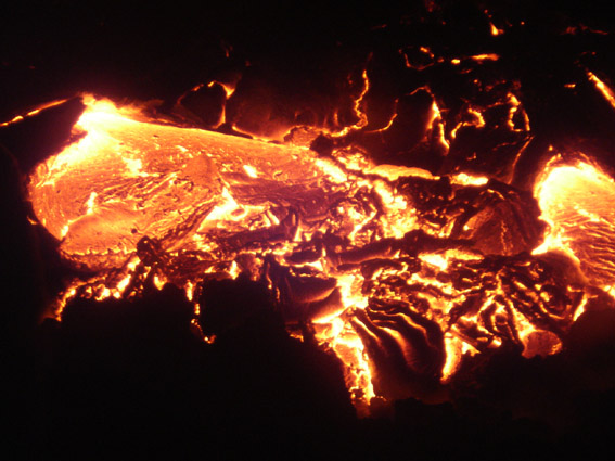 Eruption du Piton de la Fournaise (Ile de la Réunion) (Août 2004)